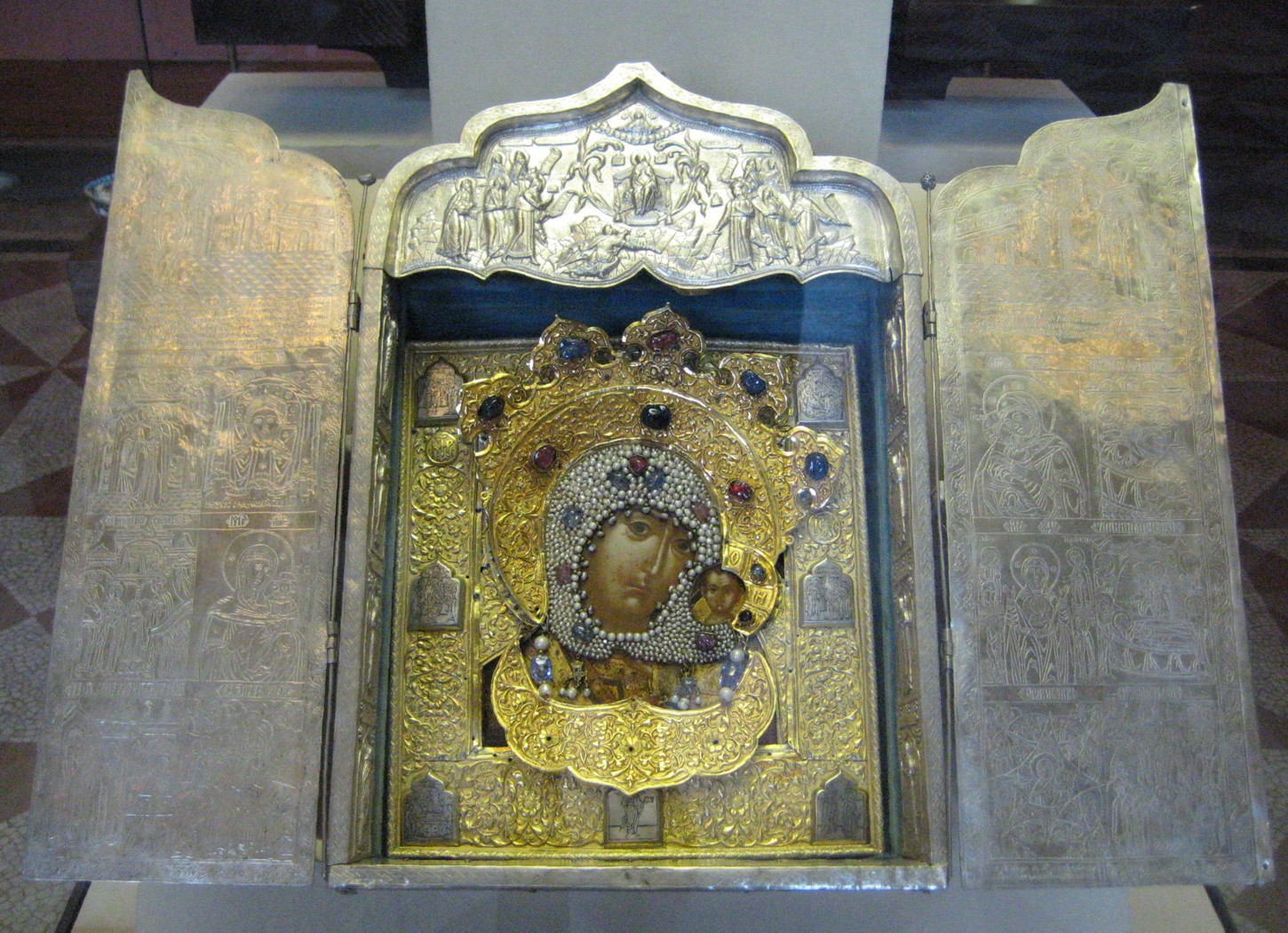 Икона Богоматерь Казанская в окладе в складене-киоте. Москва, 1-я пол. 17 века. Icon of Our Lady of Kazan in riza and in skladen-kiot.